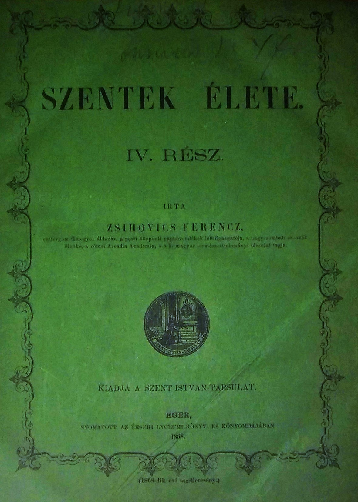 Zsihovics Ferenc (1814-1873): Szentek élete